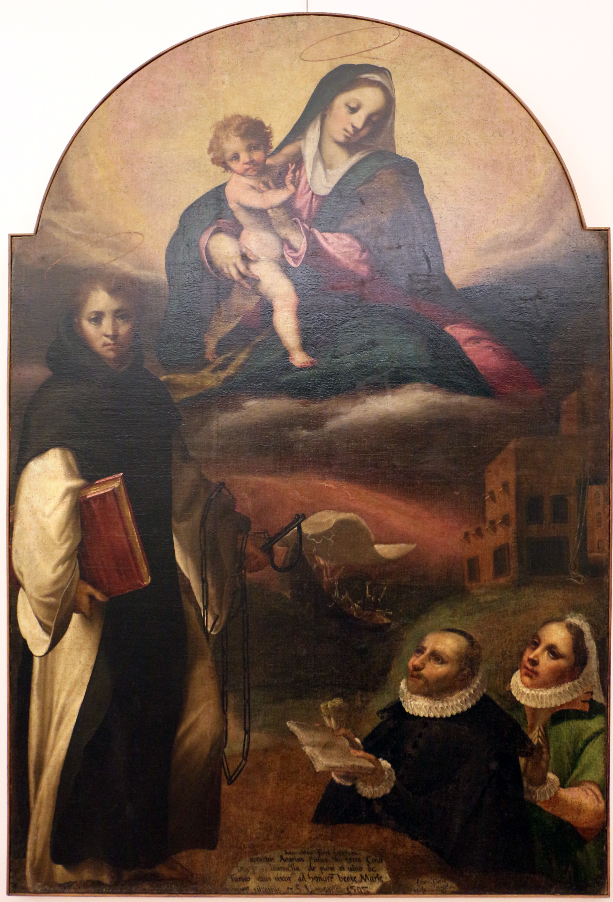 madonna col bambino, san Leonardo e i committentititle QS:P1476,it:"madonna col bambino, san Leonardo e i committenti" label QS:Lit,"madonna col bambino, san Leonardo e i committenti"